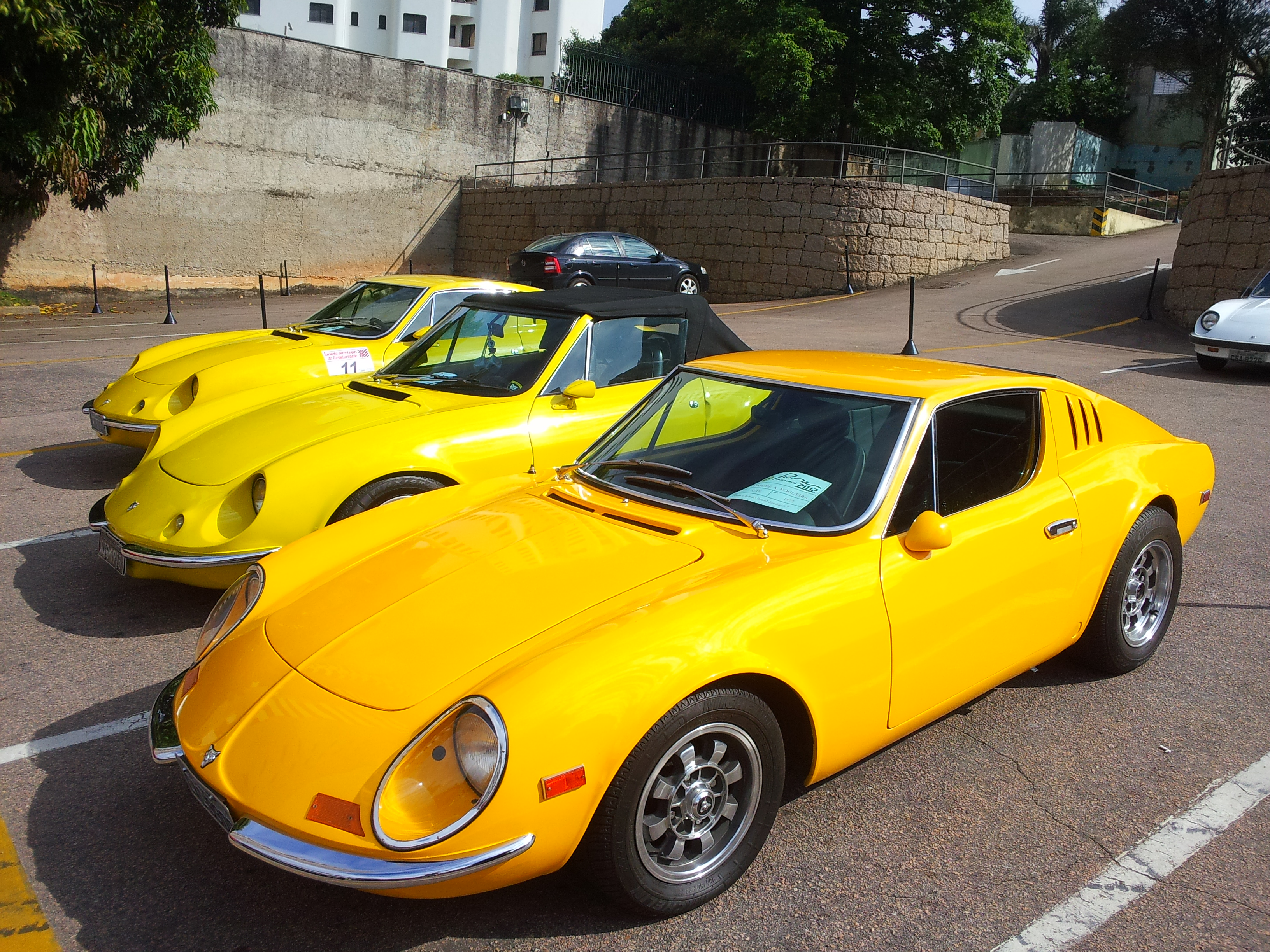 5º encontro Puma Jundiaí 2012_"Bulevar Beco Fino"_Av.Nove de Julho.